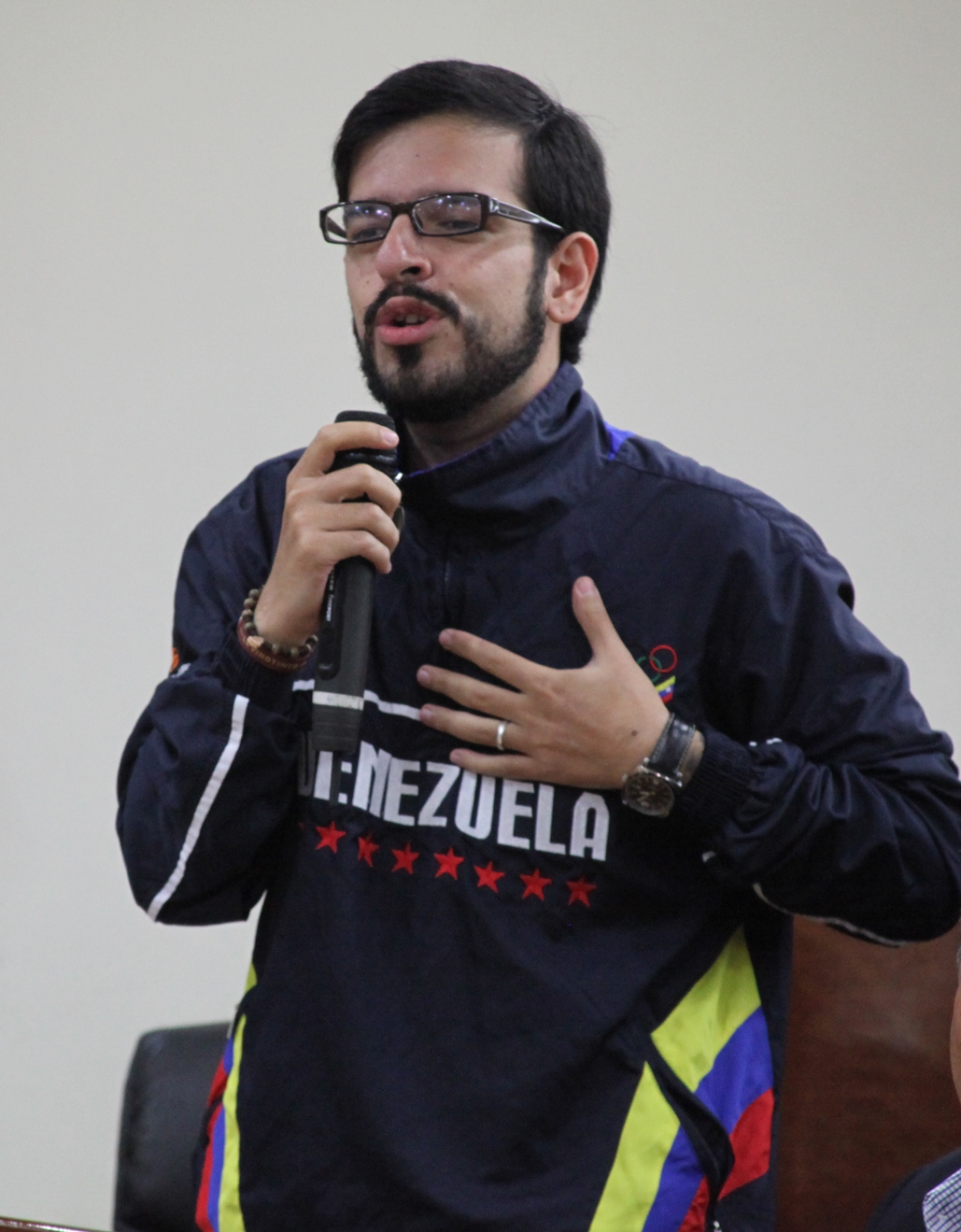 Miguel Pizarro en la Asamblea Nacional